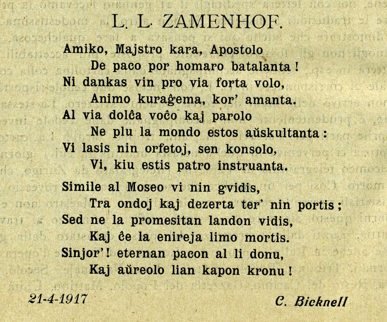 teksto de poeziaĵo verkita de Bicknell okaze de la morto morto de Zamenhof kaj aperigita en 1917 en L'Esperanto